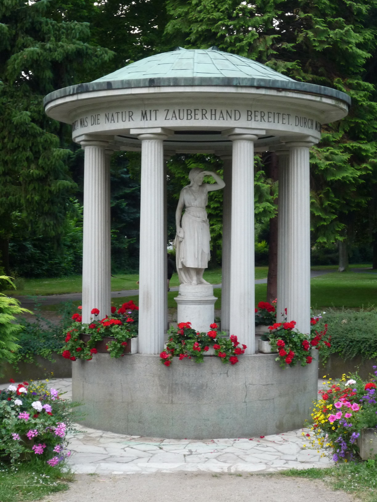 Friedrich-Karl-Sprudel - Brunnentempel im Kurpark. 1930 als Heilquelle erbohrt, gleichzeitig aber auch als Trinkbrunnen genutzt. Die Fassung in Gestalt eines Monopteros mit dorischen Säulen erhielt der Brunnen erst 1939. Die weibliche Figur in Carrara-Marmor, soll der Sonne nachblicken.